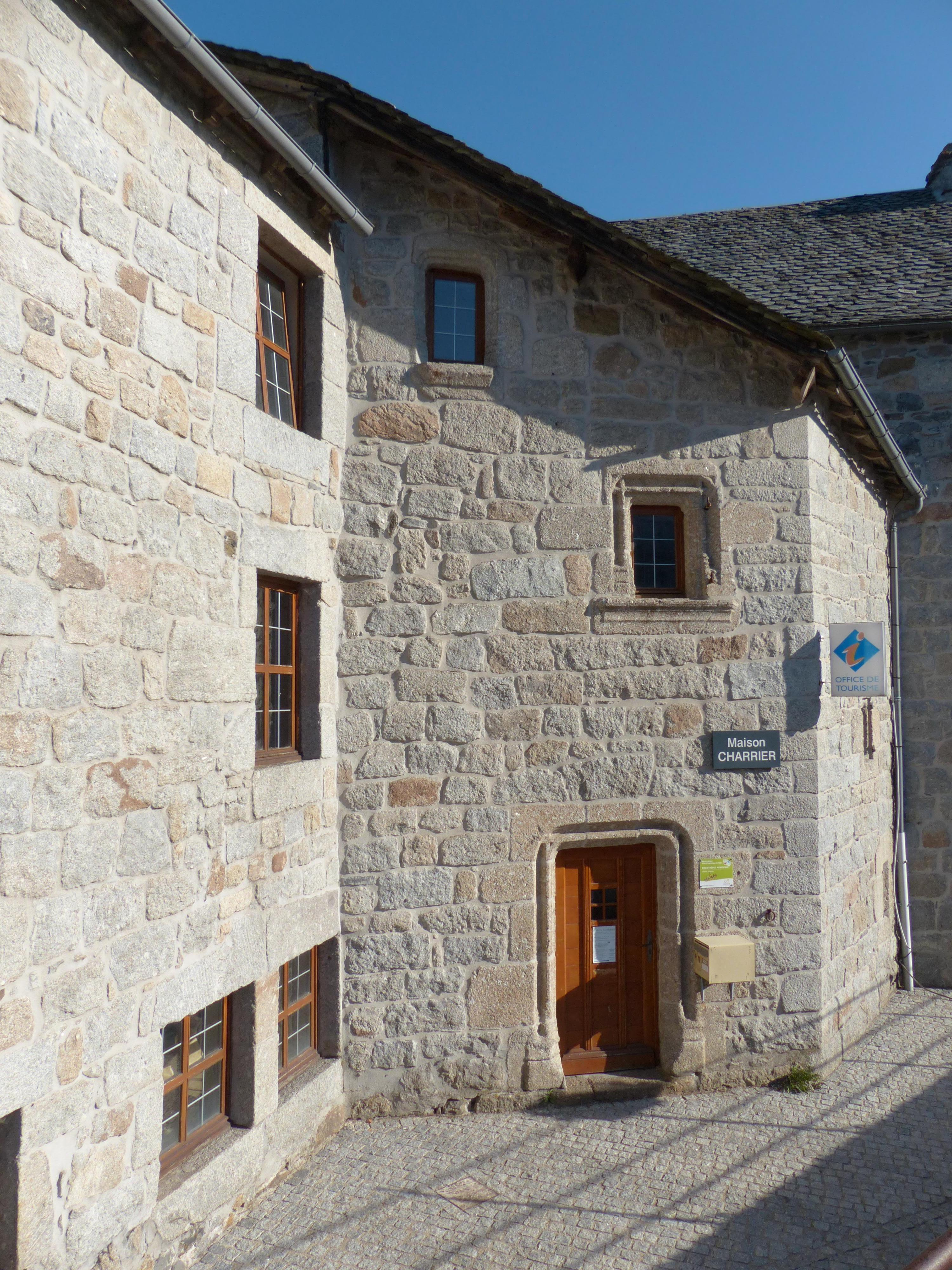 Nasbinals (Lozère). Maison Charrier (Office du tourisme).